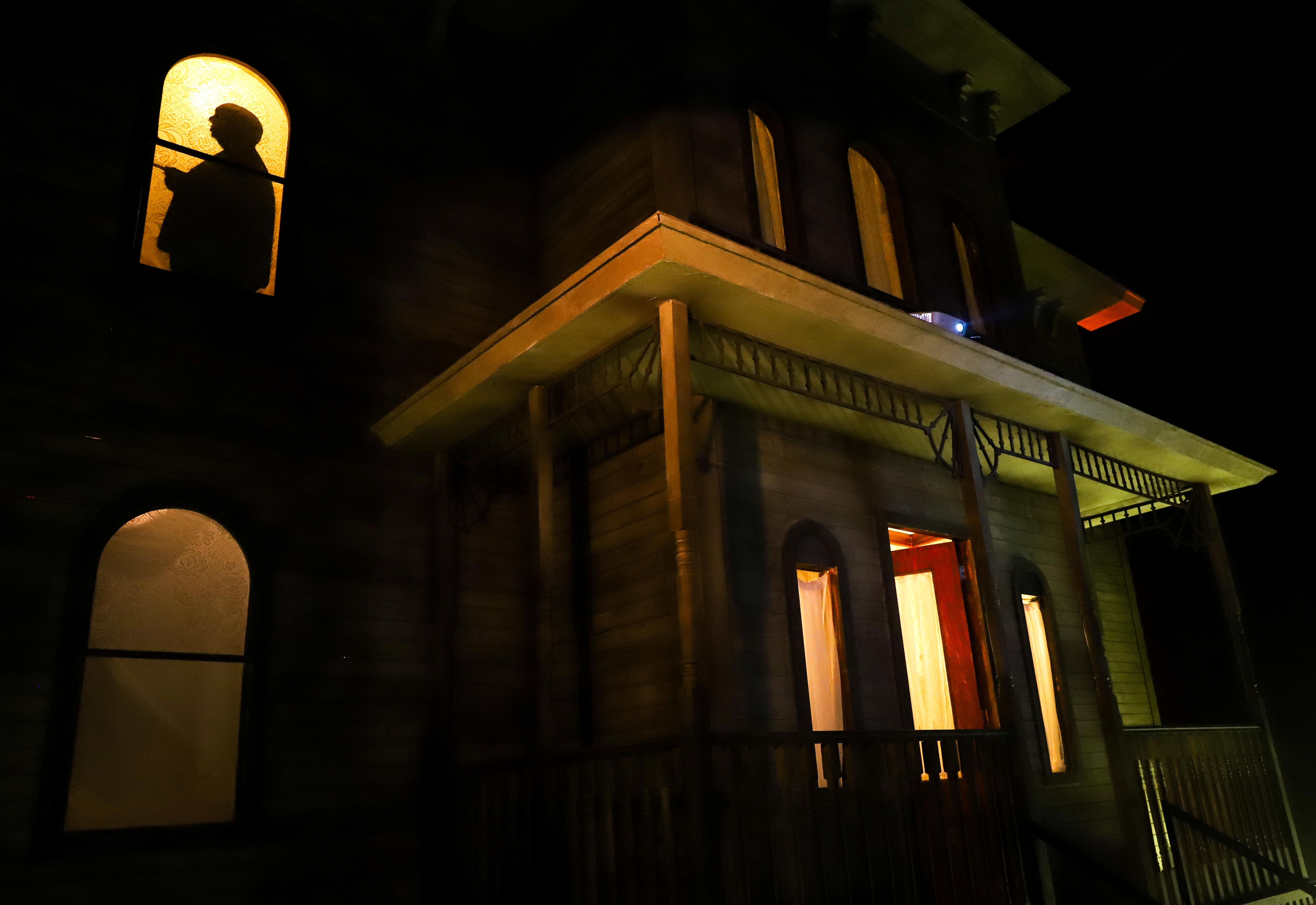 A partir da atmosfera e personalidade do cineasta considerado mestre do suspense, o MIS apresenta a exposição Hitchcock – Bastidores do suspense. Local: São Paulo/SP Data: 25/07/2018 Foto: Governo do Estado de São Paulo